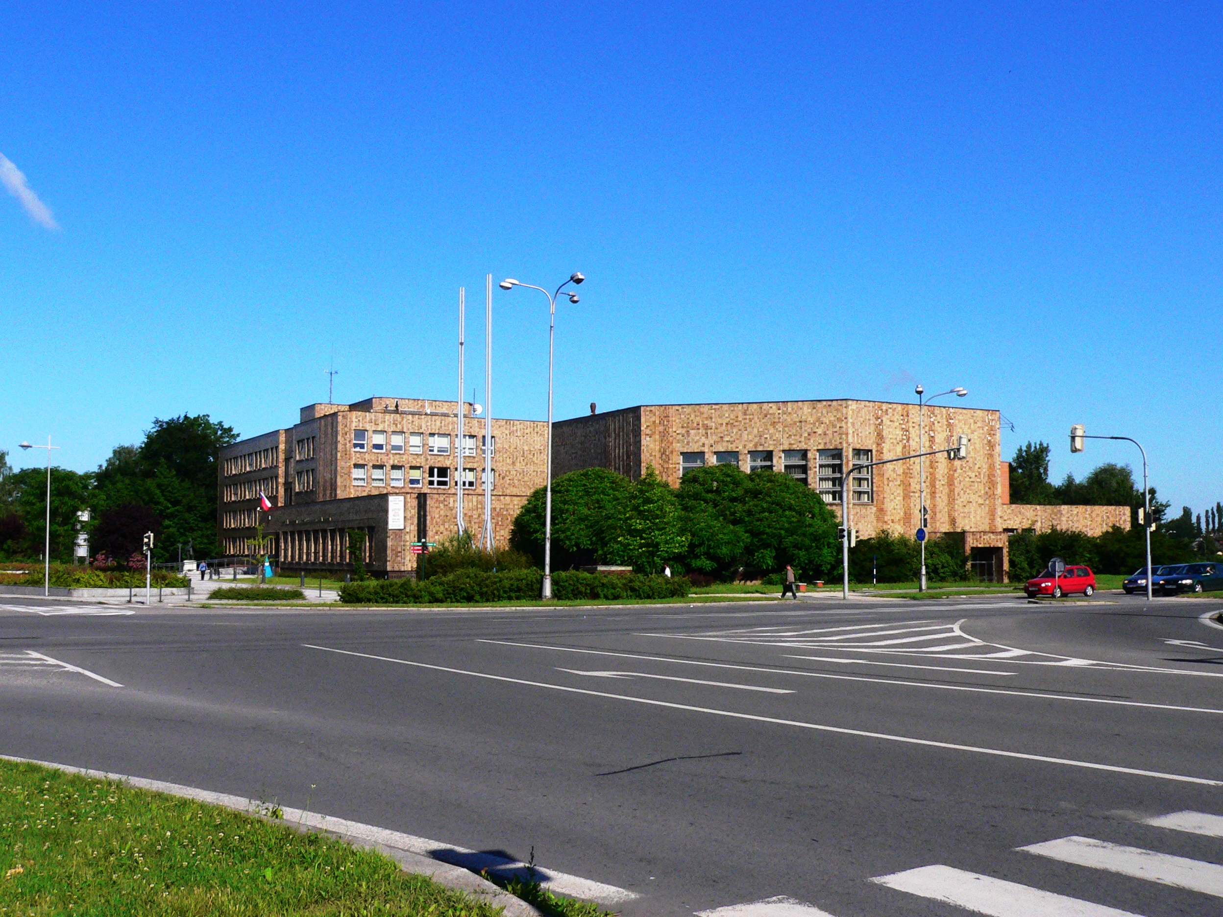 Česky: Slezská univerzita v Karviné-Fryštátě, Obchodně podnikatelská fakulta.